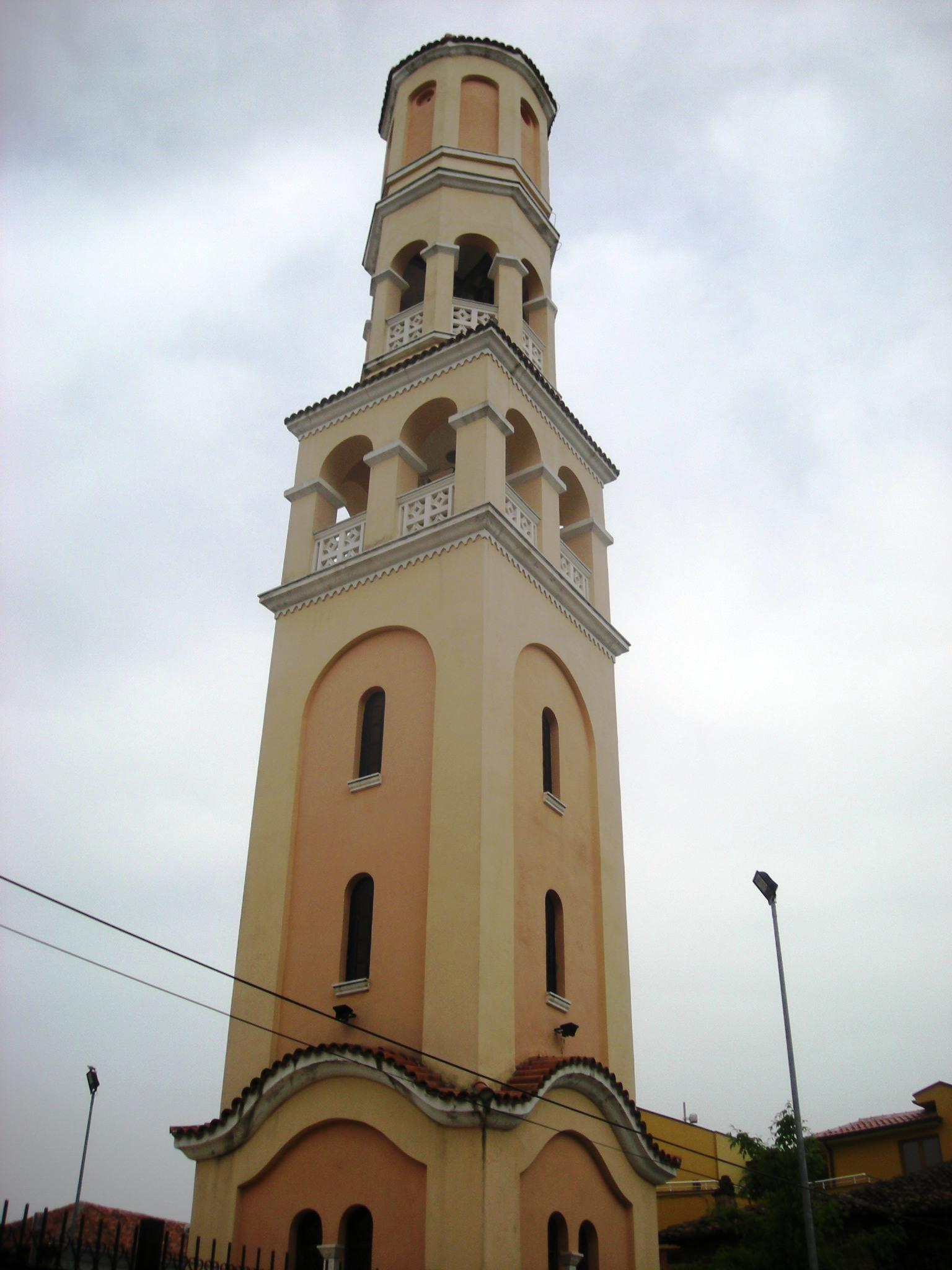 Torre de la iglesia ortodoxa de la Natividad de Cristo.